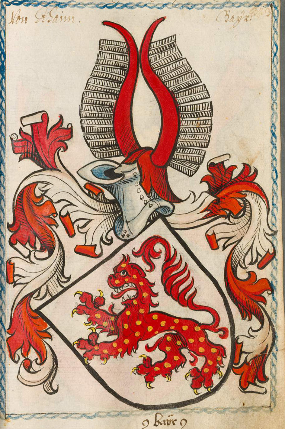 Scheibler'sches Wappenbuch , älterer Teil; Seite 323 Von Ahaim Bayr